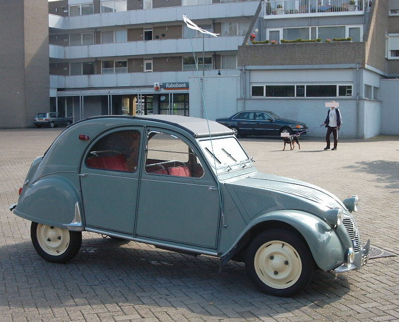 Citroën 2 CV, Baujahr 1957 (laut Beschriftung), in Kerkrade